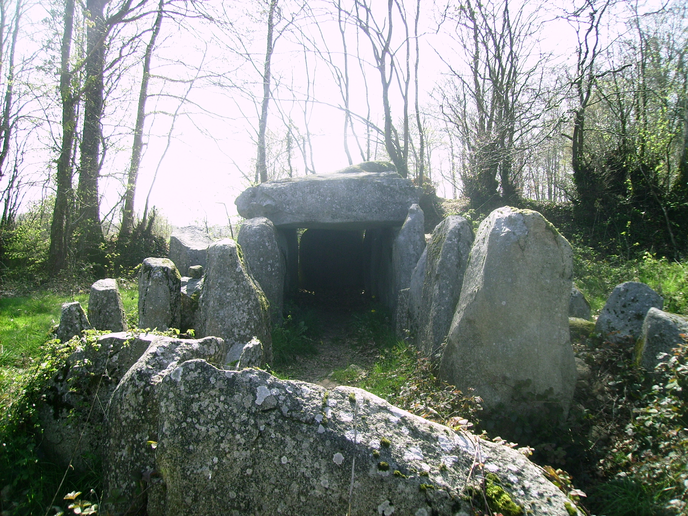 dolmen : la Table au Diable